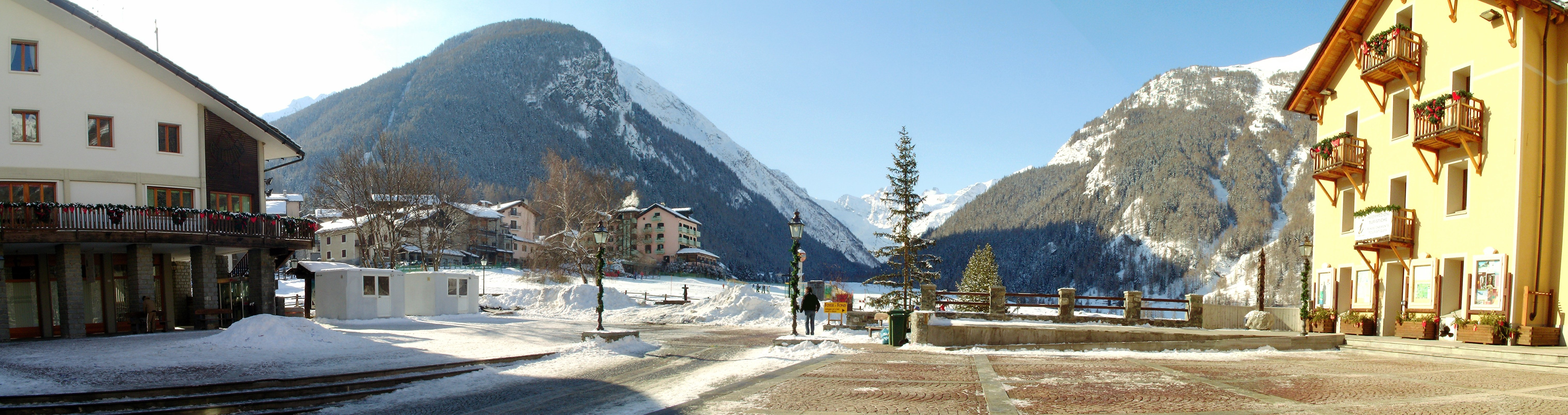 La piazza del comune di Cogne